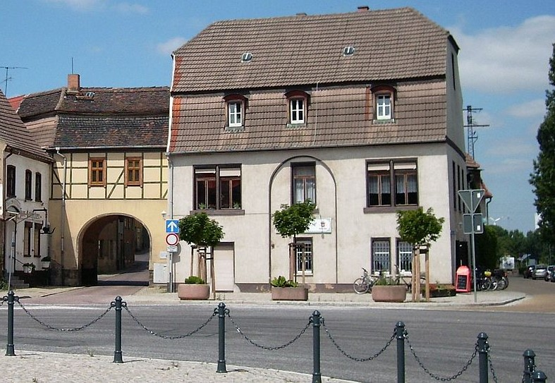 Alsleben Saaltor (von Jwaller)